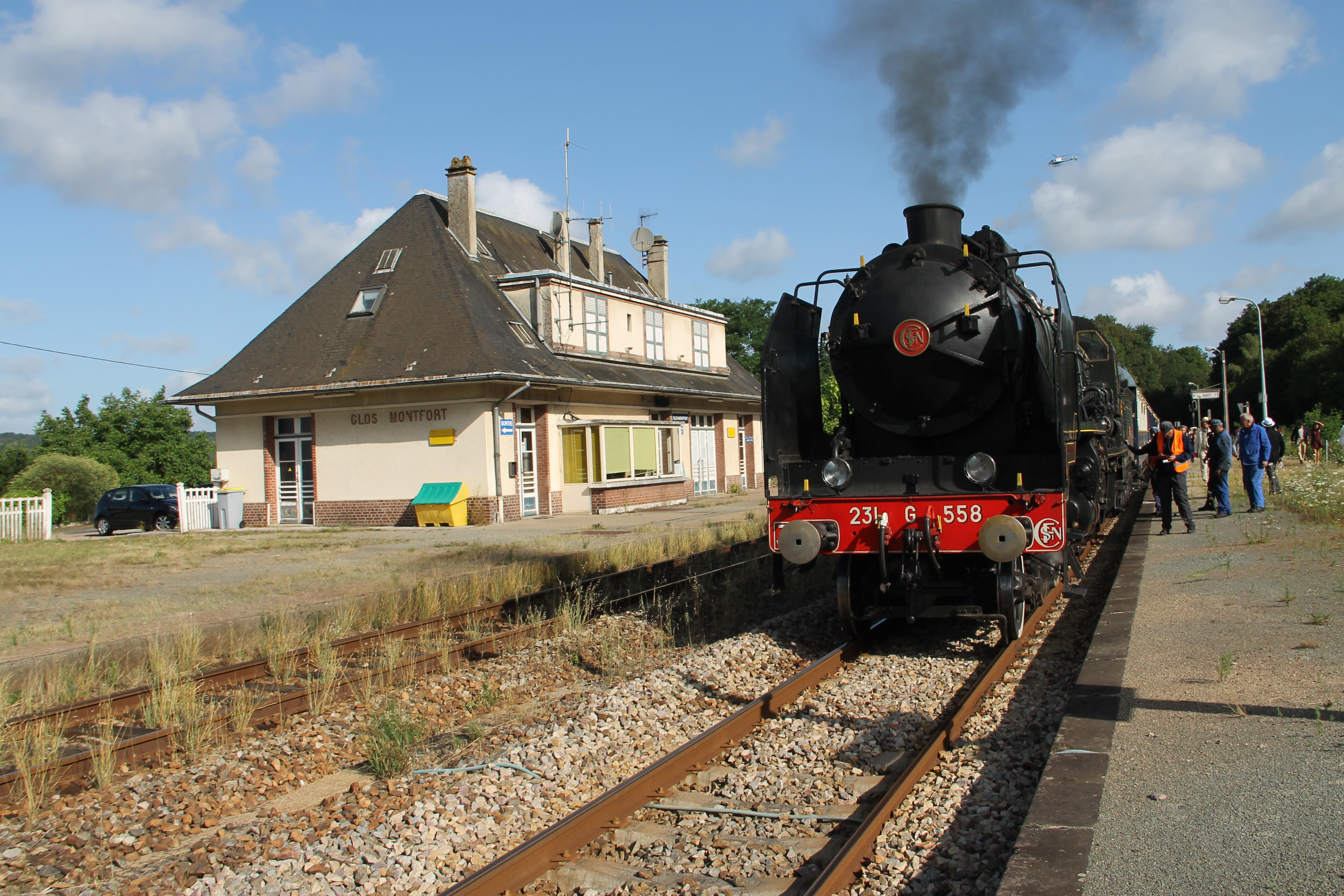 Train spécial du Pacific Vapeur Club en gare de Glos - Montfort, département de l'Eure, France.